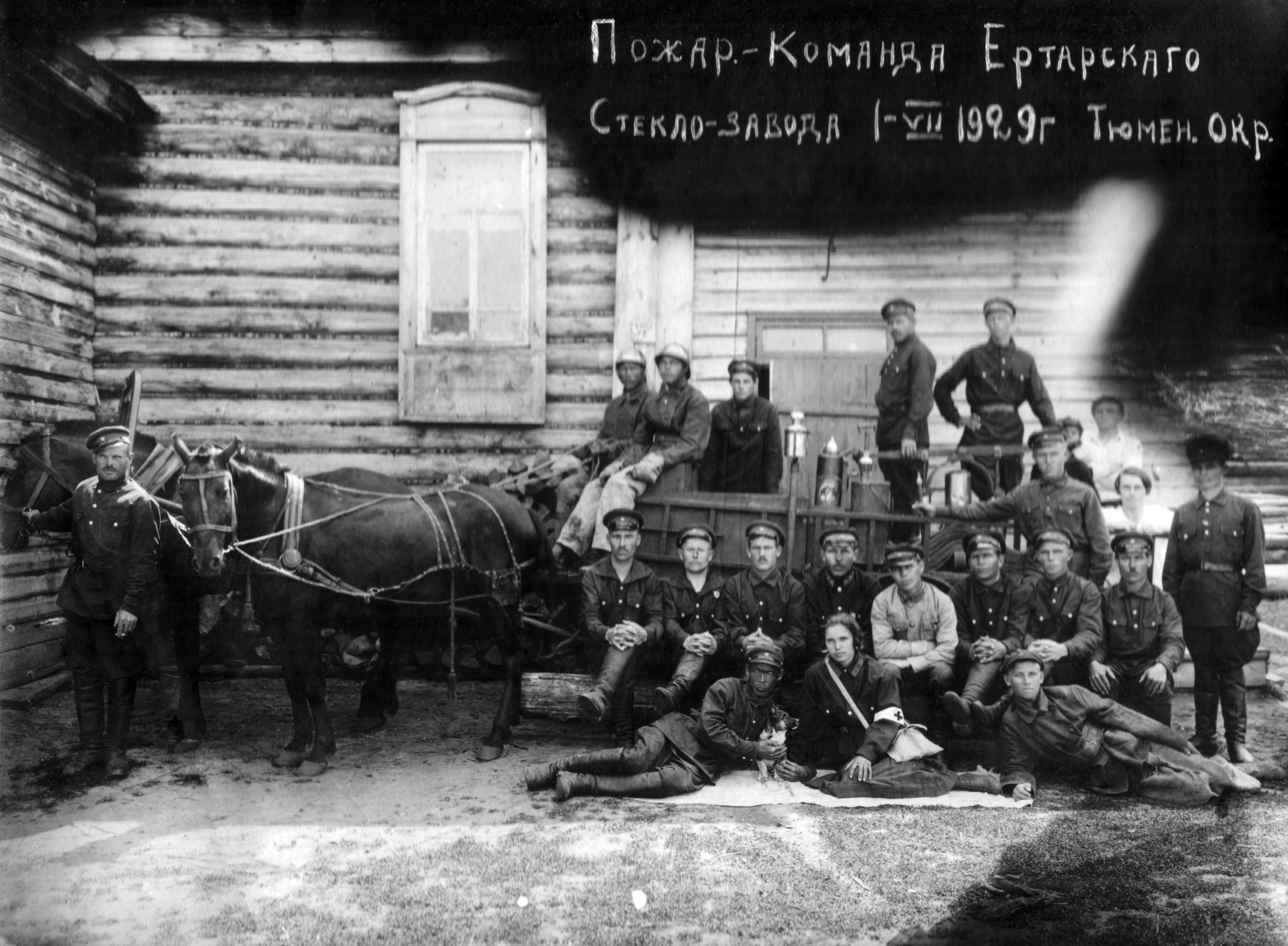 Пожарная команда Ертарского стекольного завода 1929г.